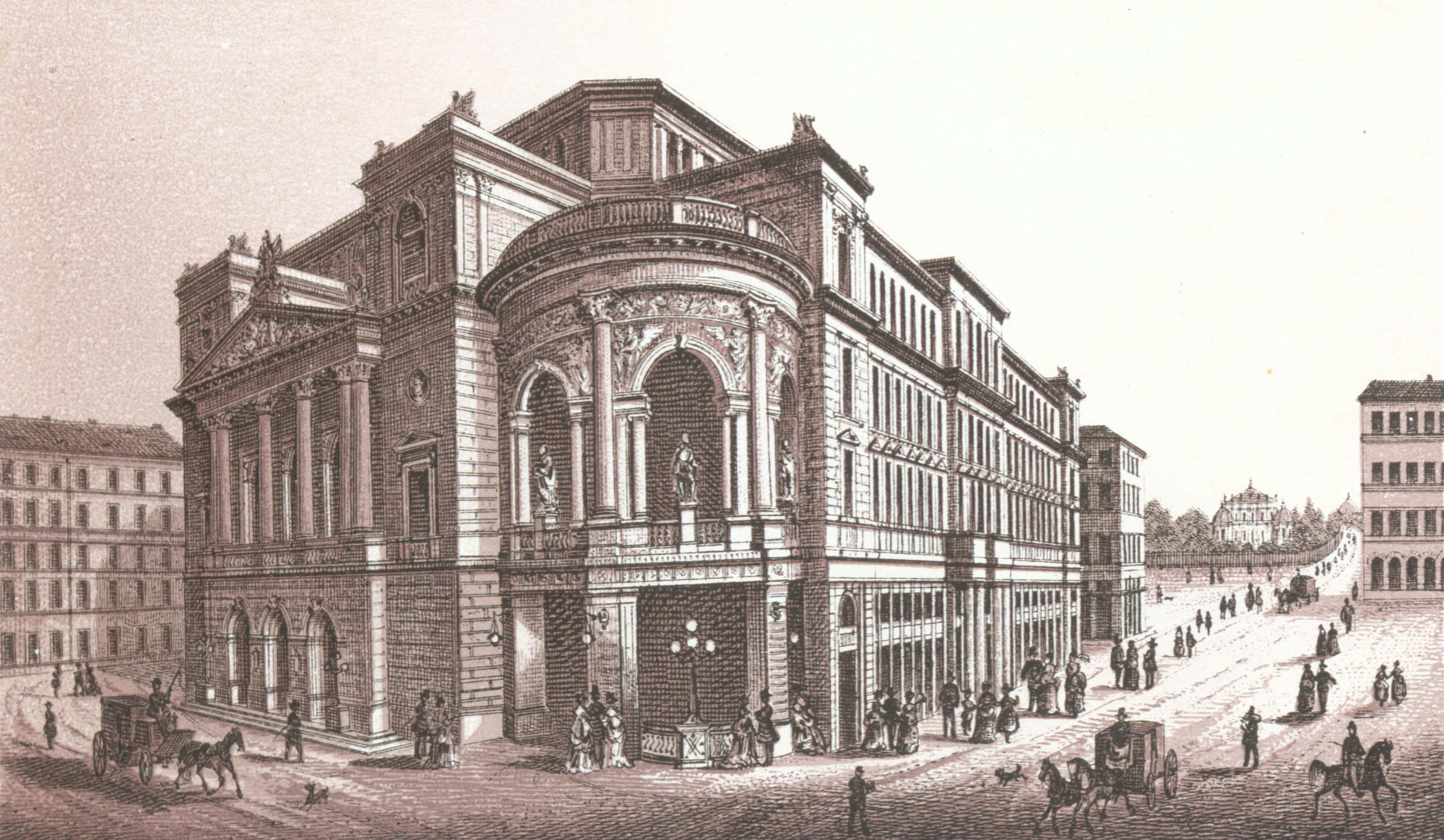 Wien, 1. Bezirk, Stadttheater Das Theater wurde 1871-1872 von Ferdinand Fellner d. Ä. und Ferdinand Fellner d. J. erbaut und mit einer Aufführung von Friedrich Schillers "Demetrius" (in der Version Heinrich Laubes) eröffnet. 1884 wurde es durch einen Brand zerstört. Unter Wiederherstellung der ursprünglichen Fassade wurde es bis 1888 wiederum von Ferdinand Fellner d. J. (inzwischen Büro Fellner & Helmer) als "Etablissement Ronacher" wiederaufgebaut.